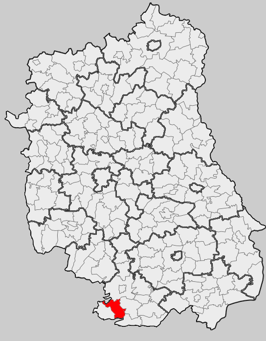 Map of gmina Biszcza, Biłgoraj county, Lublin voivodship Mapa gminy Biszcza, powiat biłgorajski, województwo lubelskie